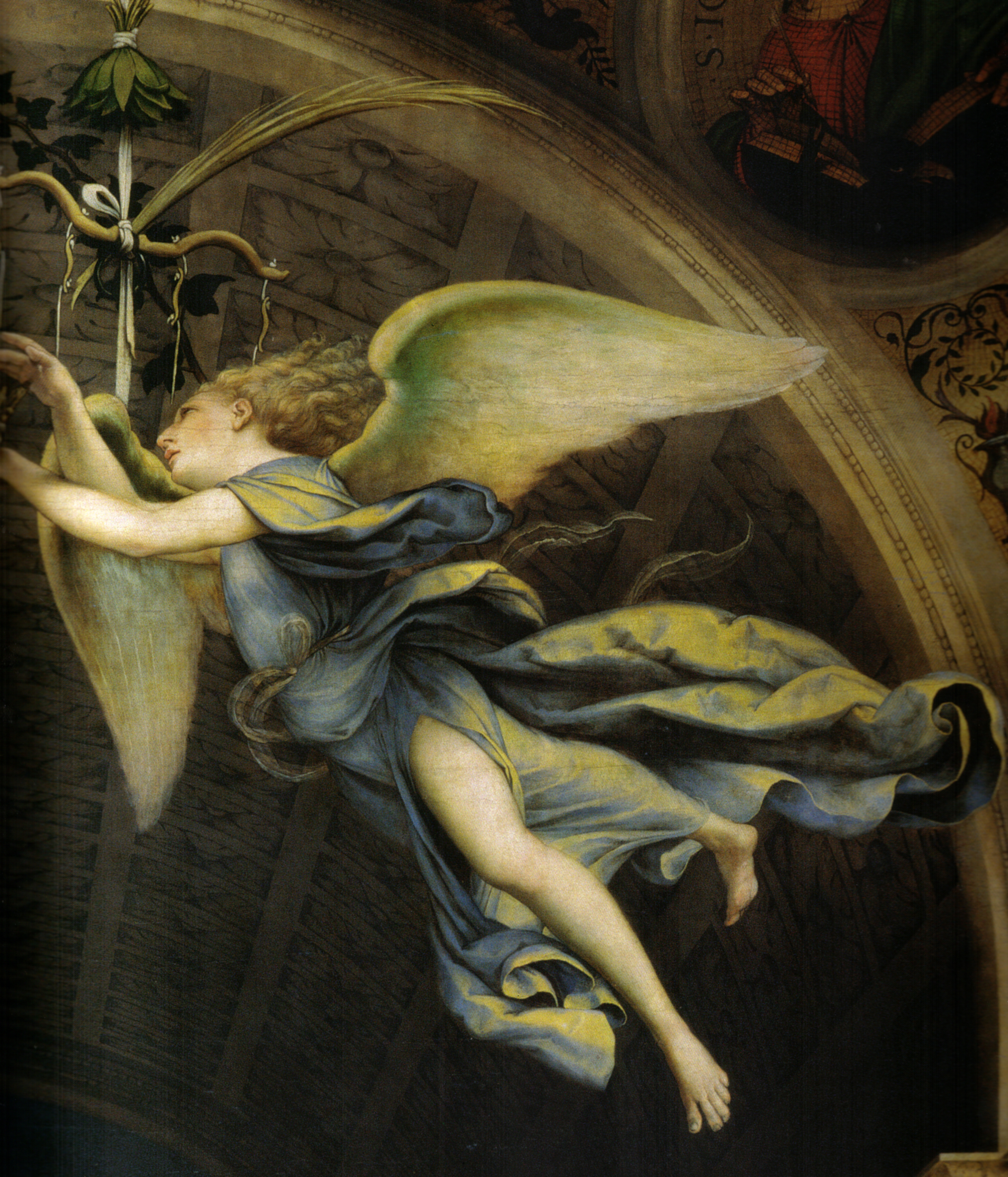 detail